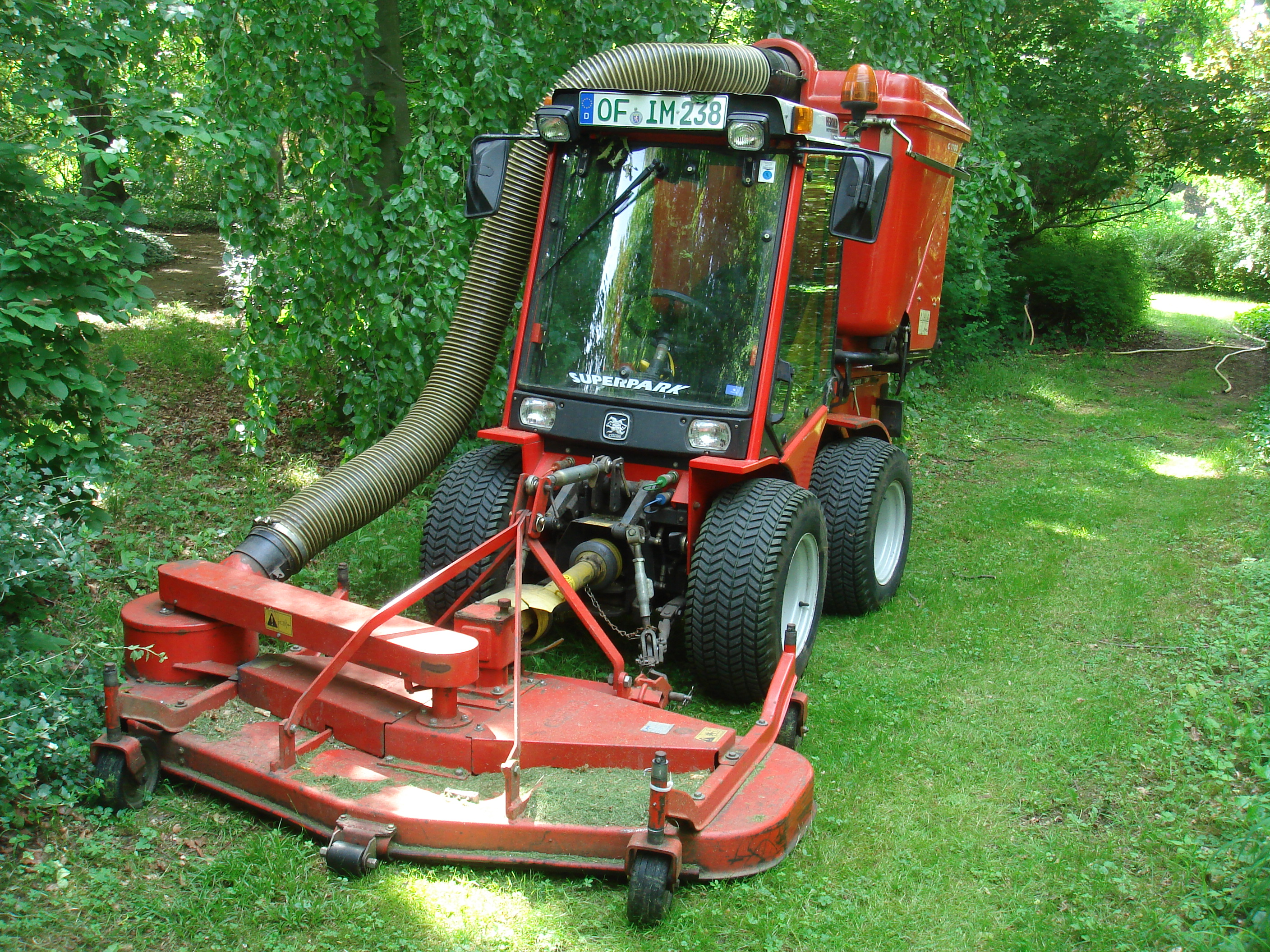 Antonio Carraro Allrad-Kompaktknicklenker Superpark 4400 HST/E mit Mähausrüstung – wassergekühlter Dreizylinder-Dieselmotor mit Direkteinspritzung (Yanmar 3TNE 88-ECR), 28 KW (39 PS), Frontzapfwelle vom Fahrantrieb unabhängig mit 2 Geschwindigkeiten 540/min und 1000/min, Differentialsperre vorne und hinten, Serienbereifung CONTINENTAL 28x9.00-15 "GARTEN", Verstellfelgen